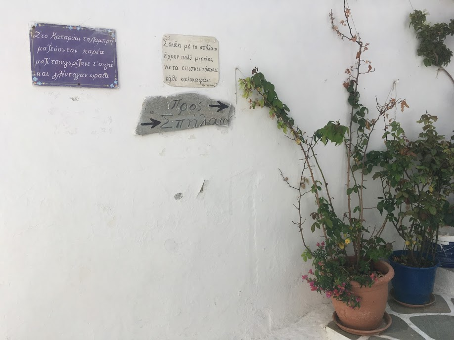 Πινακίδες κατεύθυνσης στα μονοπάτια του χωριού